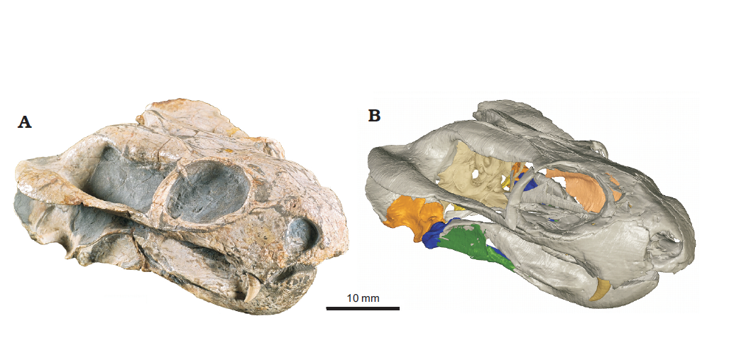 The skull of the nonmammalian synapsid Pristerodon mackayi (Therapsida, Anomodontia) (MB.R.985) from the Late Permian of Biesjespoort, South Africa. A. Photograph of dorsal and lateral view. B. Virtual 3D model of same view.